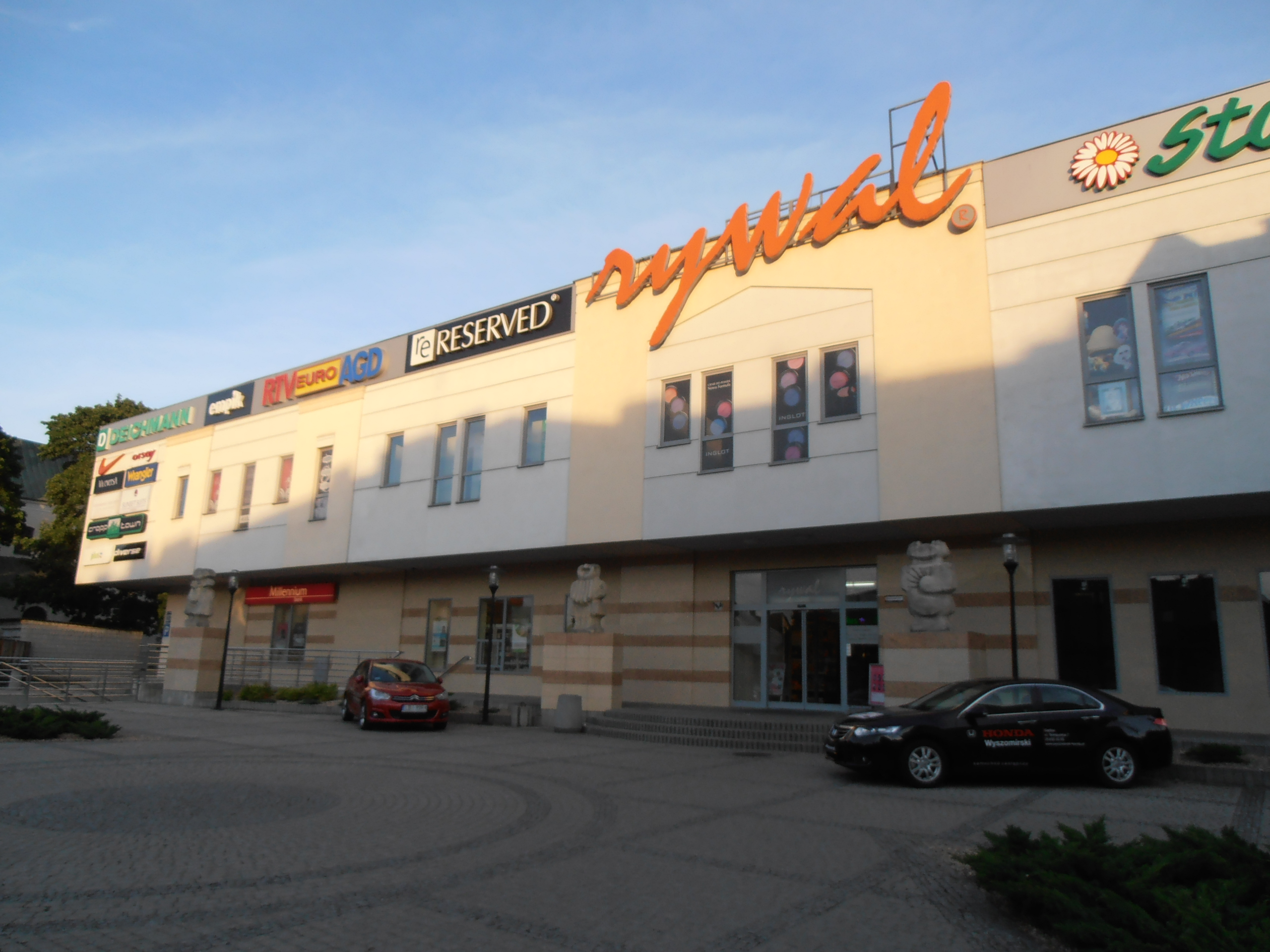 Biała Podlaska. Sklepowisko „Rywal”, widok starszej części. Kiepskie to zdjęcie.